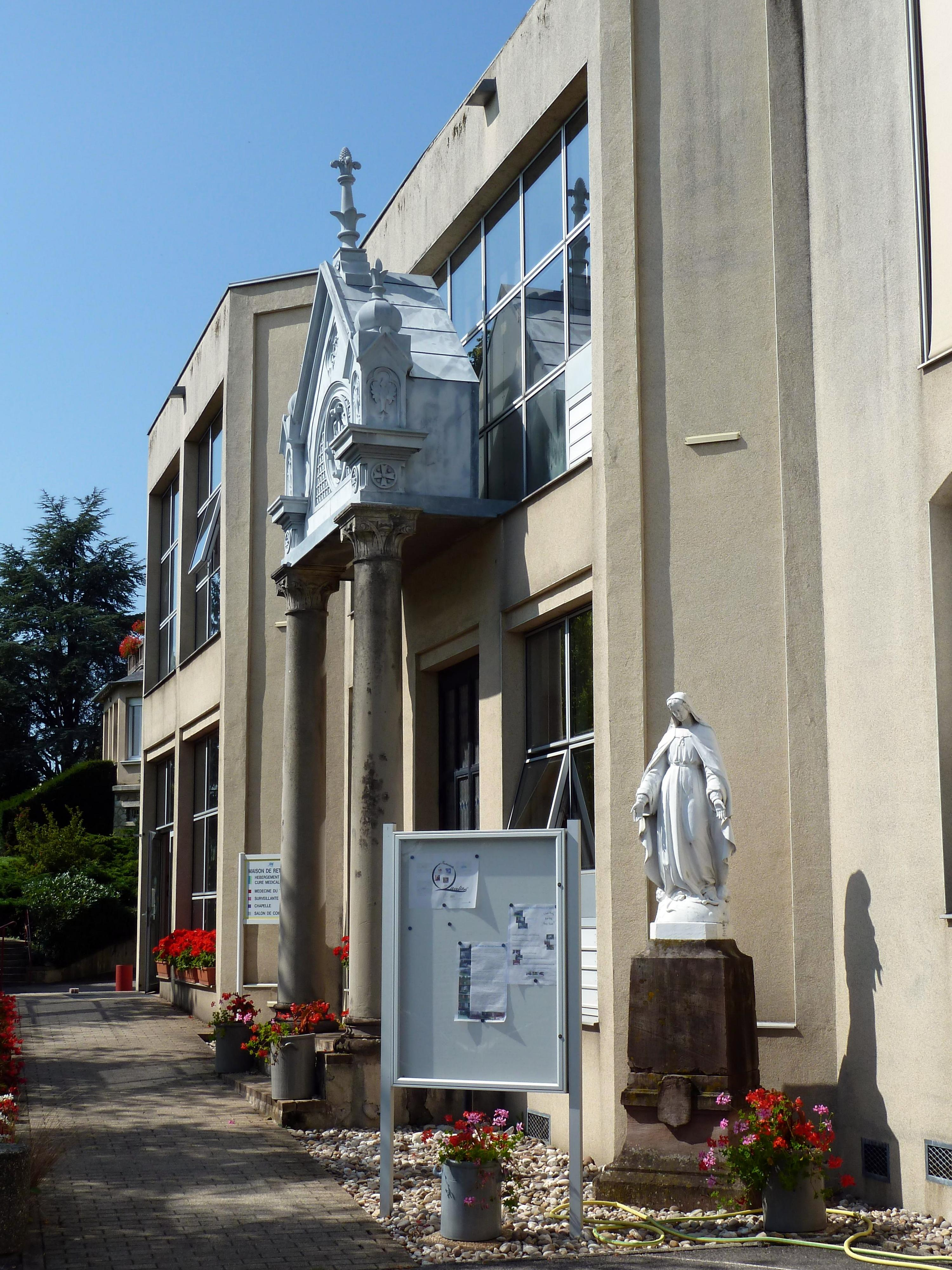 Cirey-sur-Vezouze maison de retraite sise dans un ancien couvent des Soeurs de la Charité de Strasbourg.